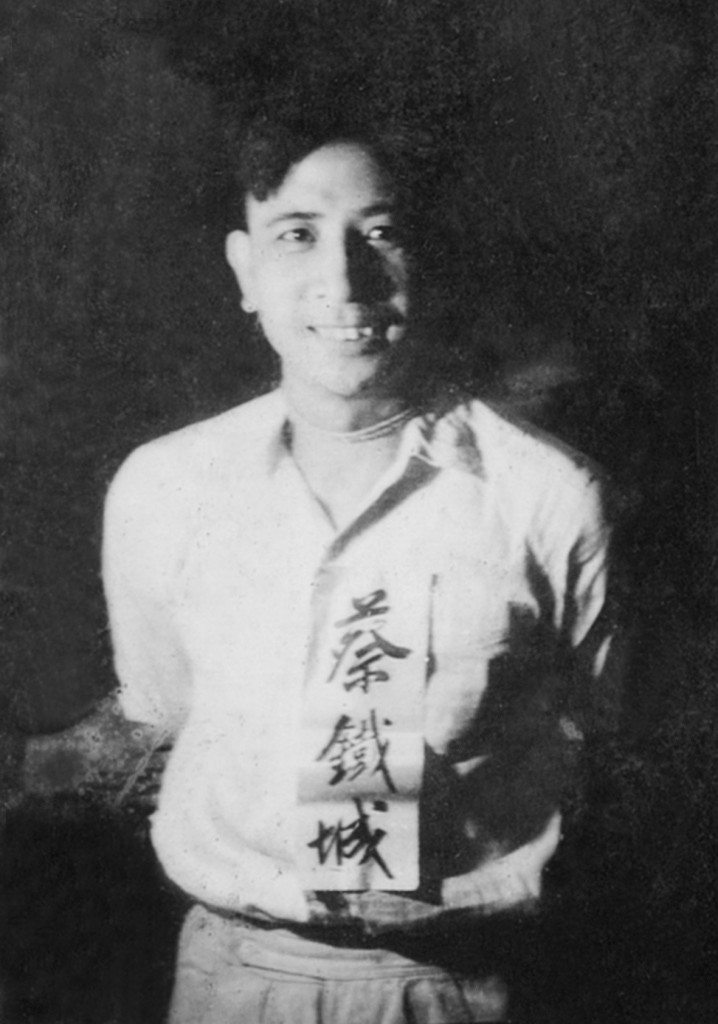 蔡鐵城槍決前照片